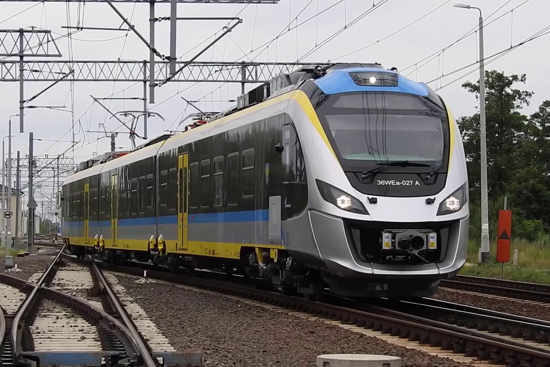 Elektryczny zespół trakcyjny 36WEa-027 dla województwa opolskiego odjeżdża ze stacji Żmigród w stronę Wrocławia podczas jazd testowych.